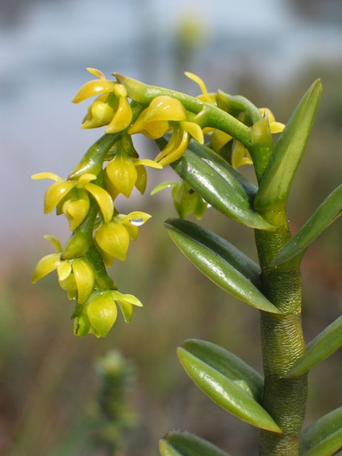 Epidendrum dendrobioides @ Roraima-Tepui, Venezuela